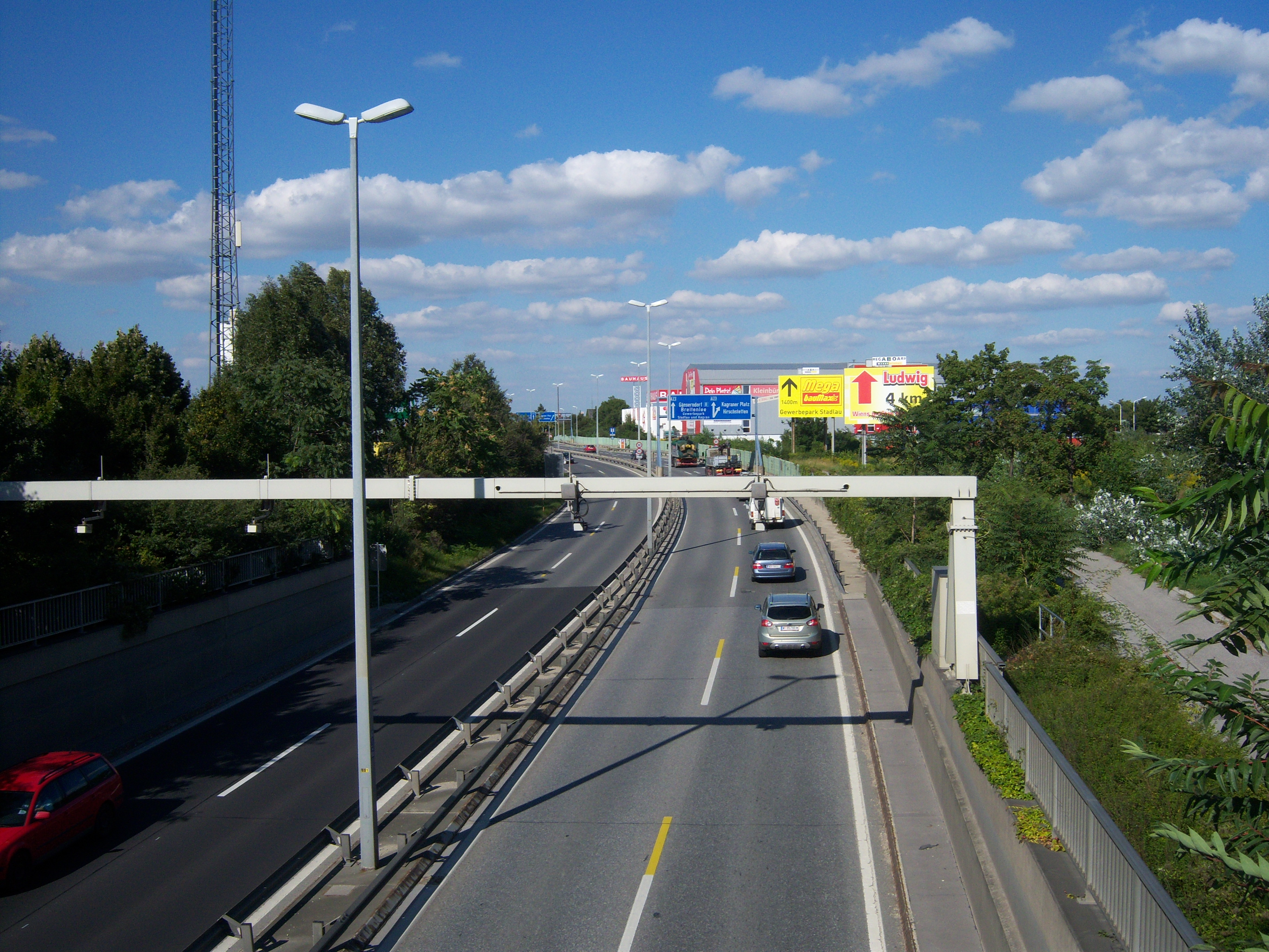 Die Autobahn Südosttangente Wien A23 vor der Anschlussstelle Hirschstetten